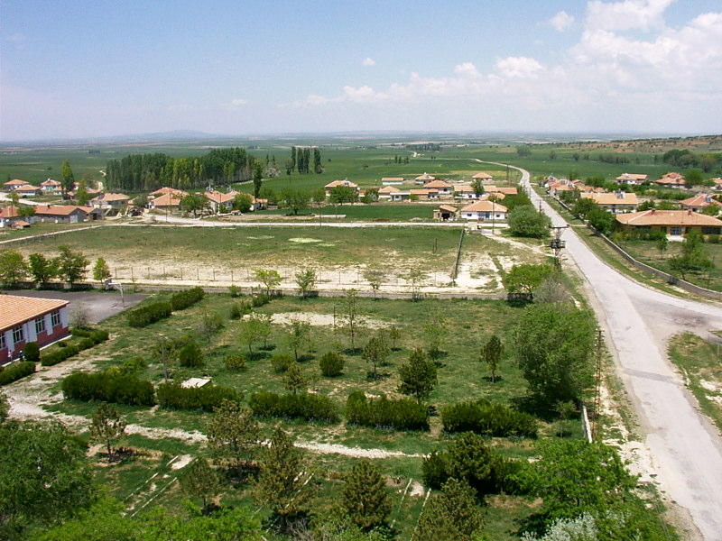 Köşektaş köyü Hacıbektaş, Nevşehir